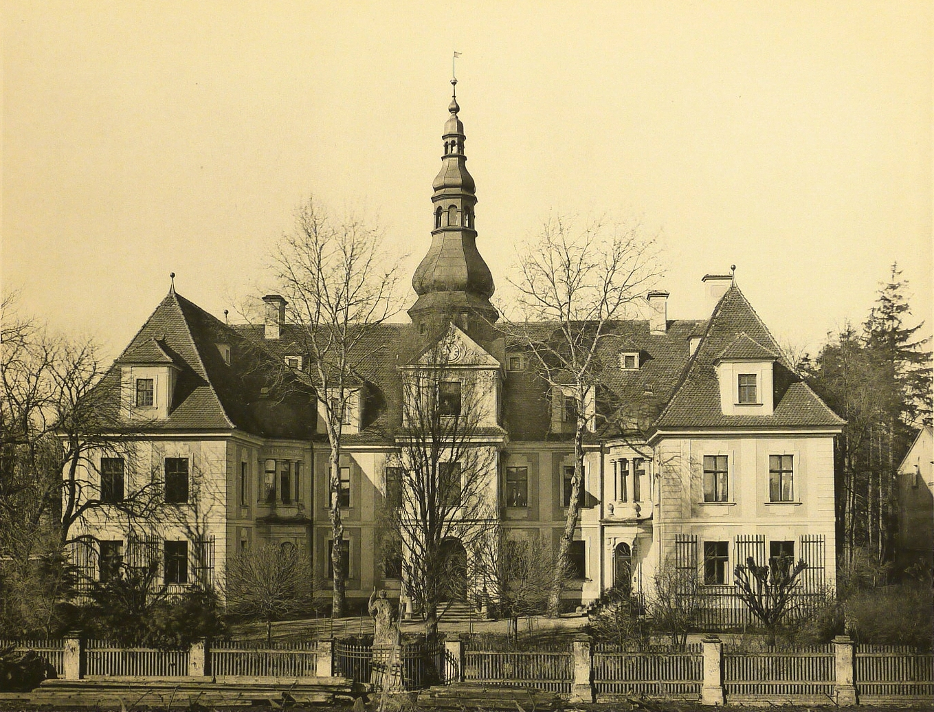 Ehemaliges Rittergut und Schloss Brockau um 1940